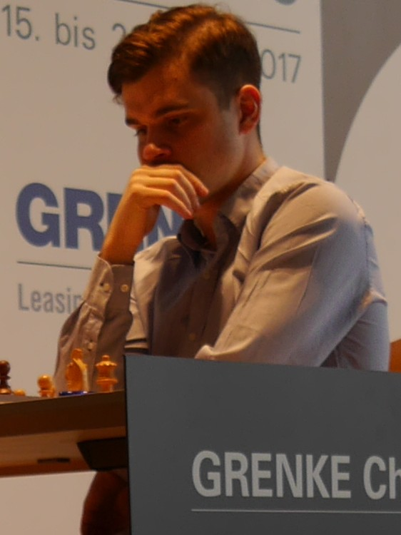 Maxim Matlakov, Grenke Chess Open 2017 in Karlsruhe.